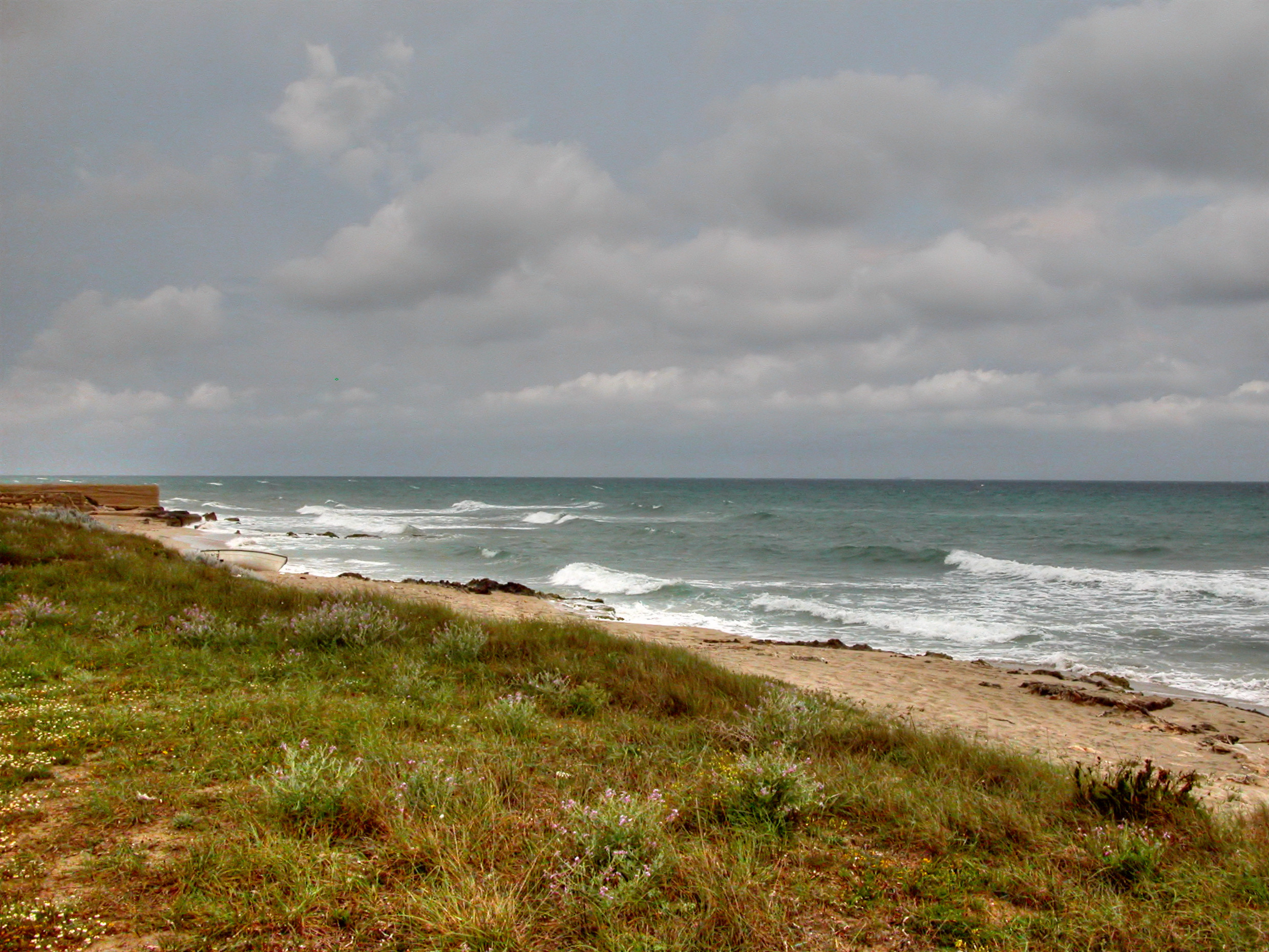 Autore e data: Stefano Trezzi ( yoruno sparisci sott'acqua 13:07, 6 mag 2007 (CEST) ) Fonte: scatto da me eseguito. Descrizione: Riserva naturale Le Cesine, 26 aprile 2007 Licensing Licenza d'uso: Creative Commons BY-SA 3.0